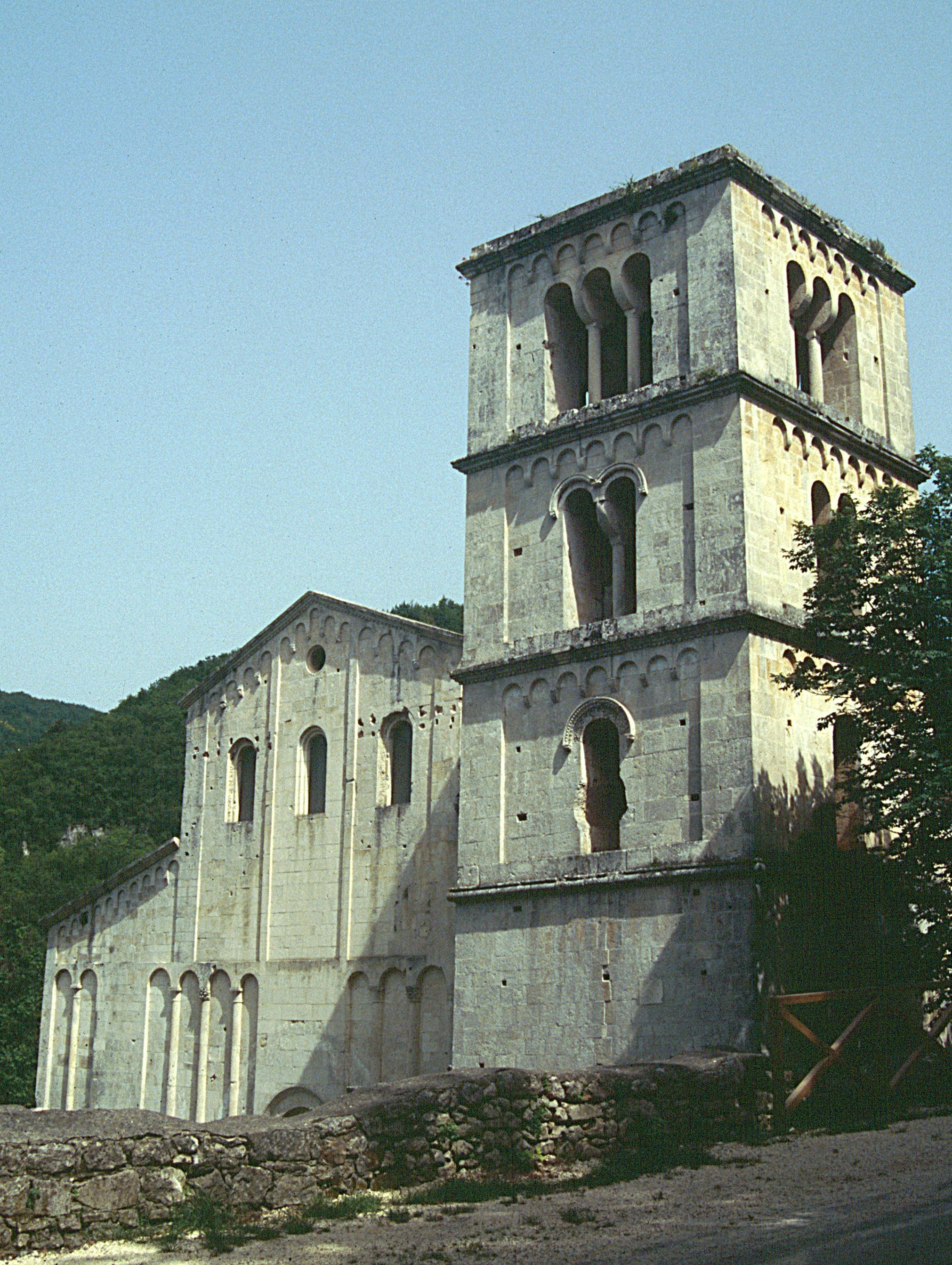 San Liberatore a Majella